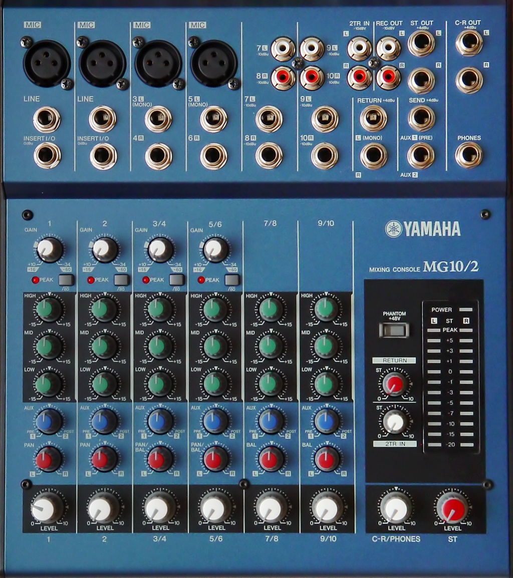 Yamaha analog mixing concole MG10/2 AKA MG102